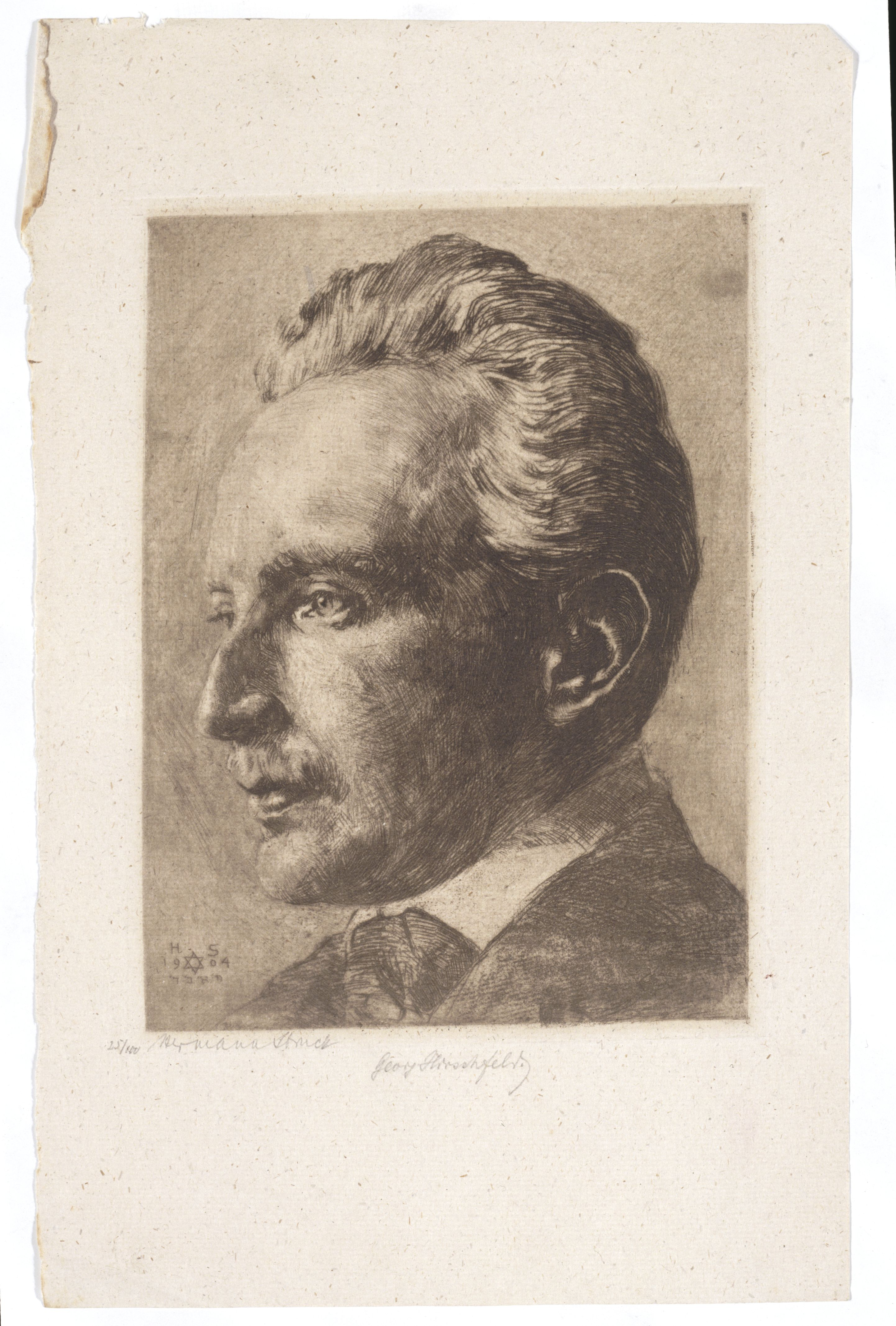 Artwork by Hermann Struck Dargestellte Person: Hirschfeld, Georg (1837 - 1942), DNB-Link Datierung Display: 1904 Objektart: Vernis mou, Radierung Schlagworte Inhalt /Geografie: Mann, Porträt Schlagworte Kontext: Schriftsteller